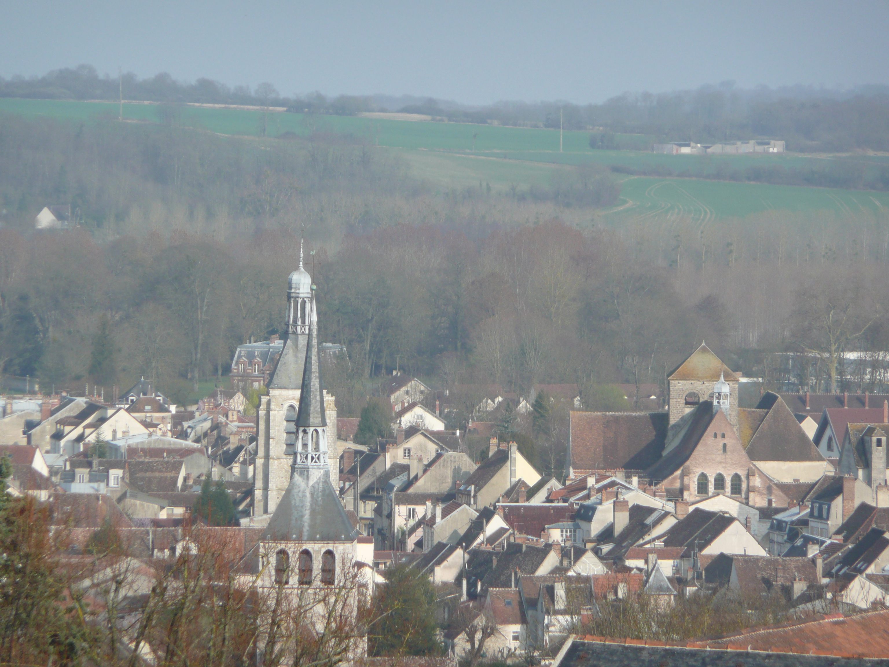 Vue générale, depuis la Tour César, de la ville de Provins (France)